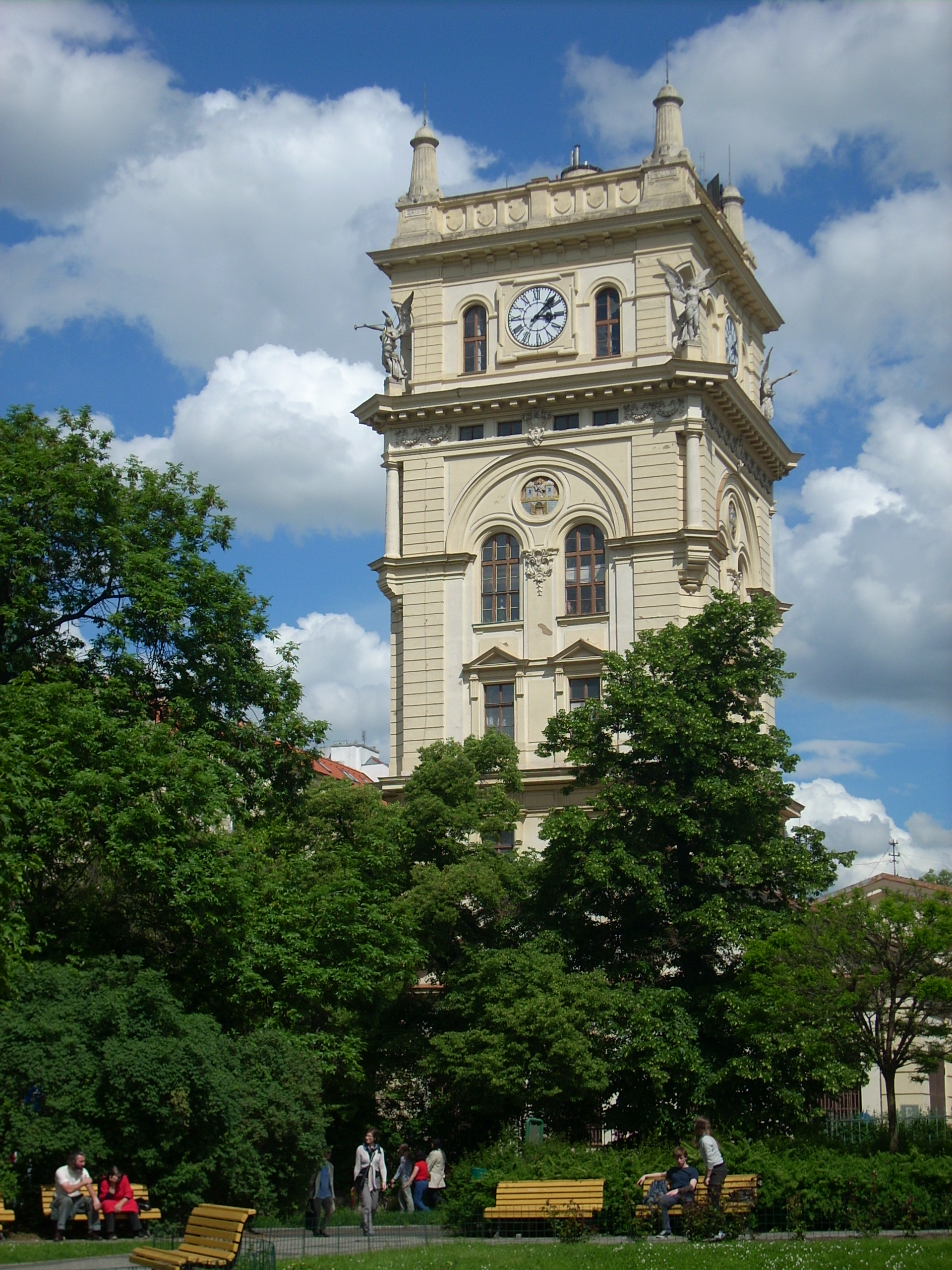 Vinohradská vodárenská věž, Praha 2-Vinohrady, Korunní 725/66